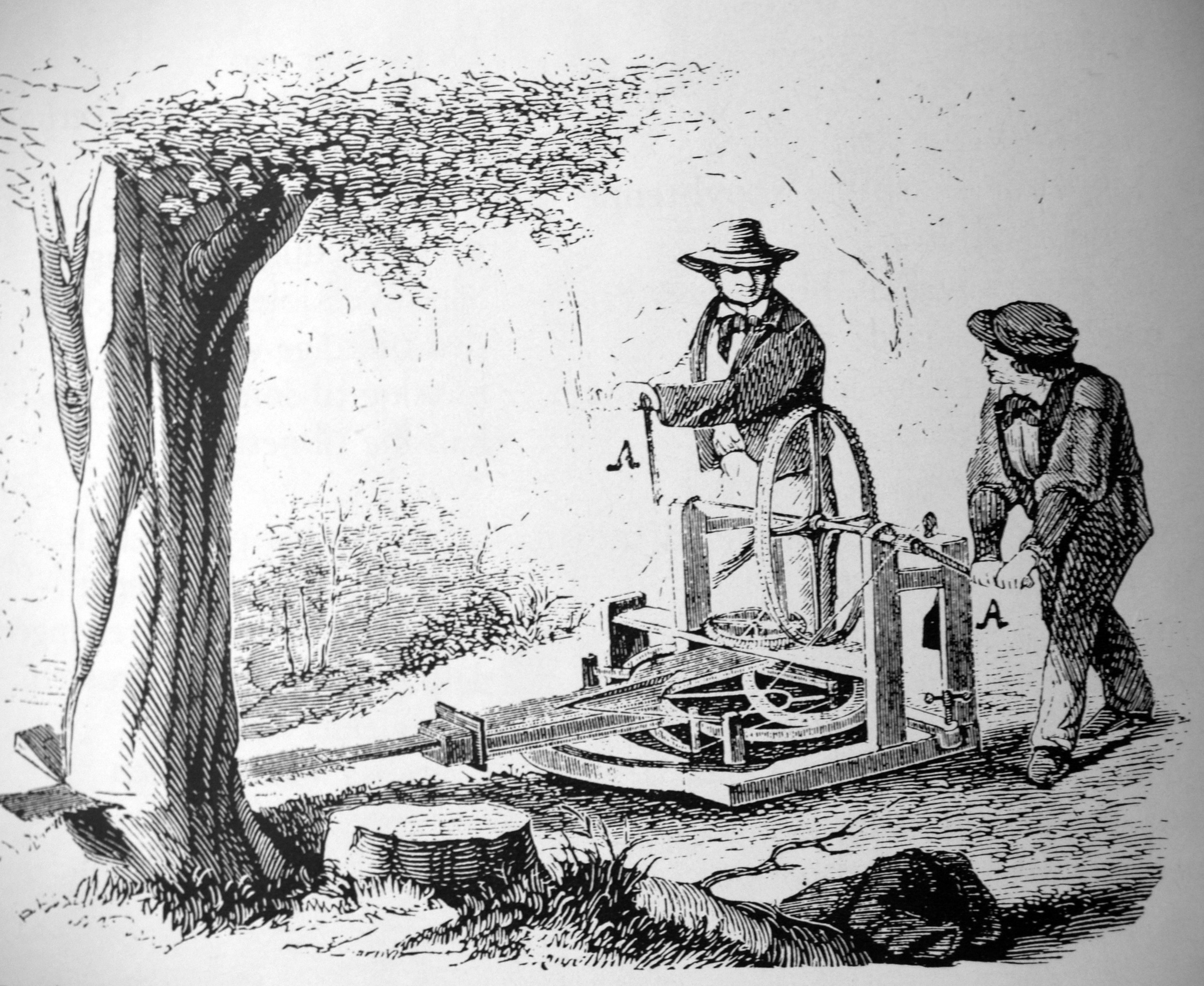 Ei trefellongsmaskin frå 1880-åra.